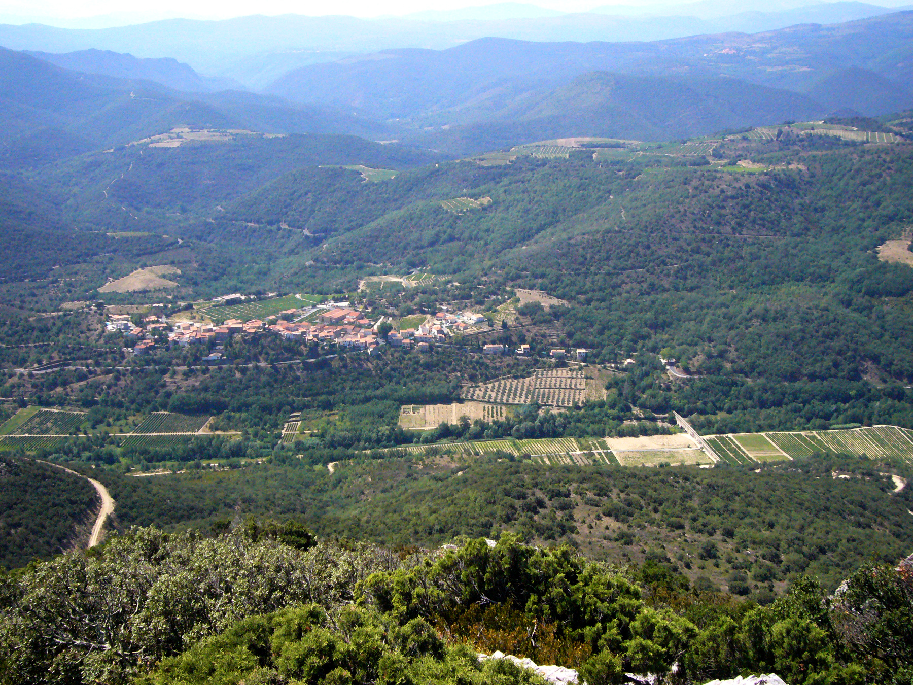 Le village d'Ansignan (Pyrénées-Orientales, France) et son aqueduc romain, vus depuis le roc de Vergès (584 m.)